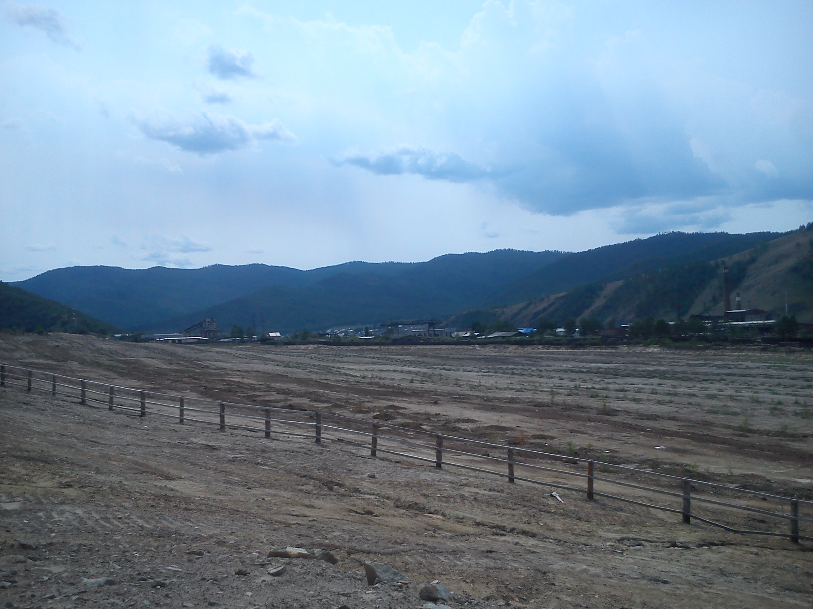 Рекультивация на территории хвостохранилища Джидинского ВМК, расчищенной от отвалов отходов обогащения рудоносных пород.